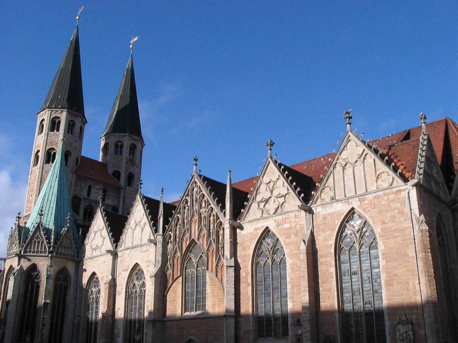 St. Martini Church in Braunschweig, Germany, view from south.